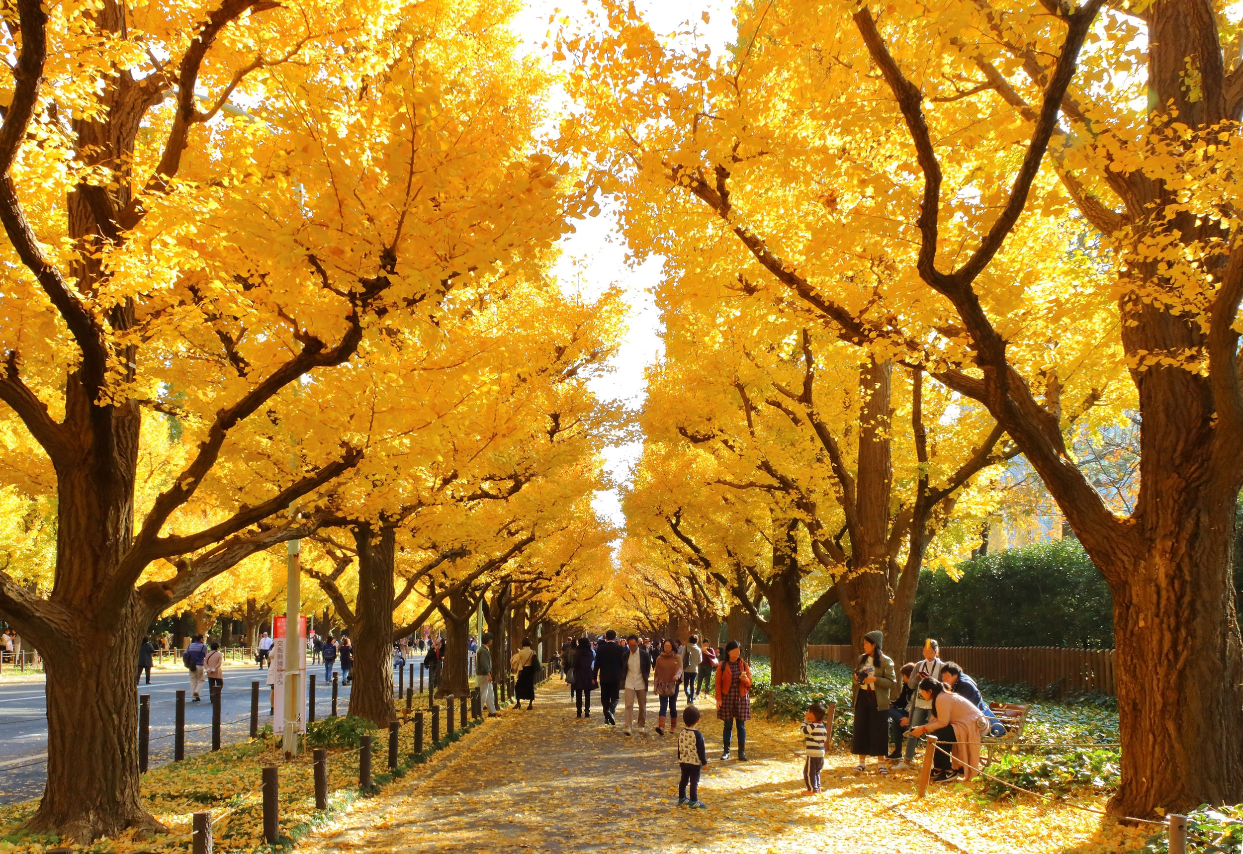 明治神宮外苑の銀杏並木。